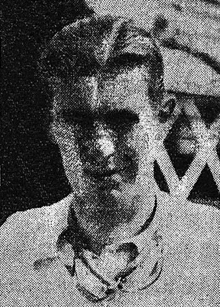 Guy Bouriat en 1933.